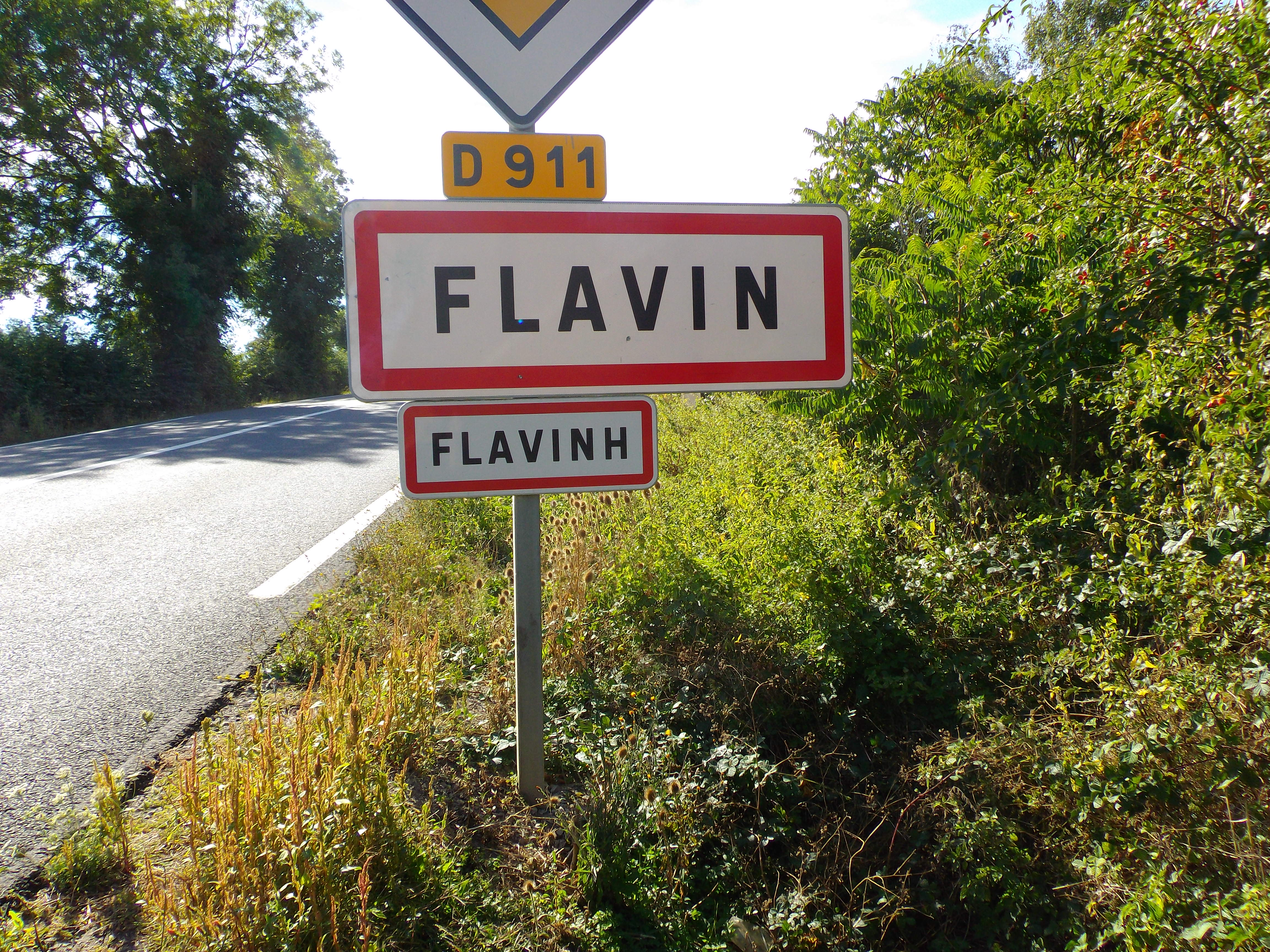 Panneau bilingue français-occitan à l'entrée de Flavin (Aveyron, France)